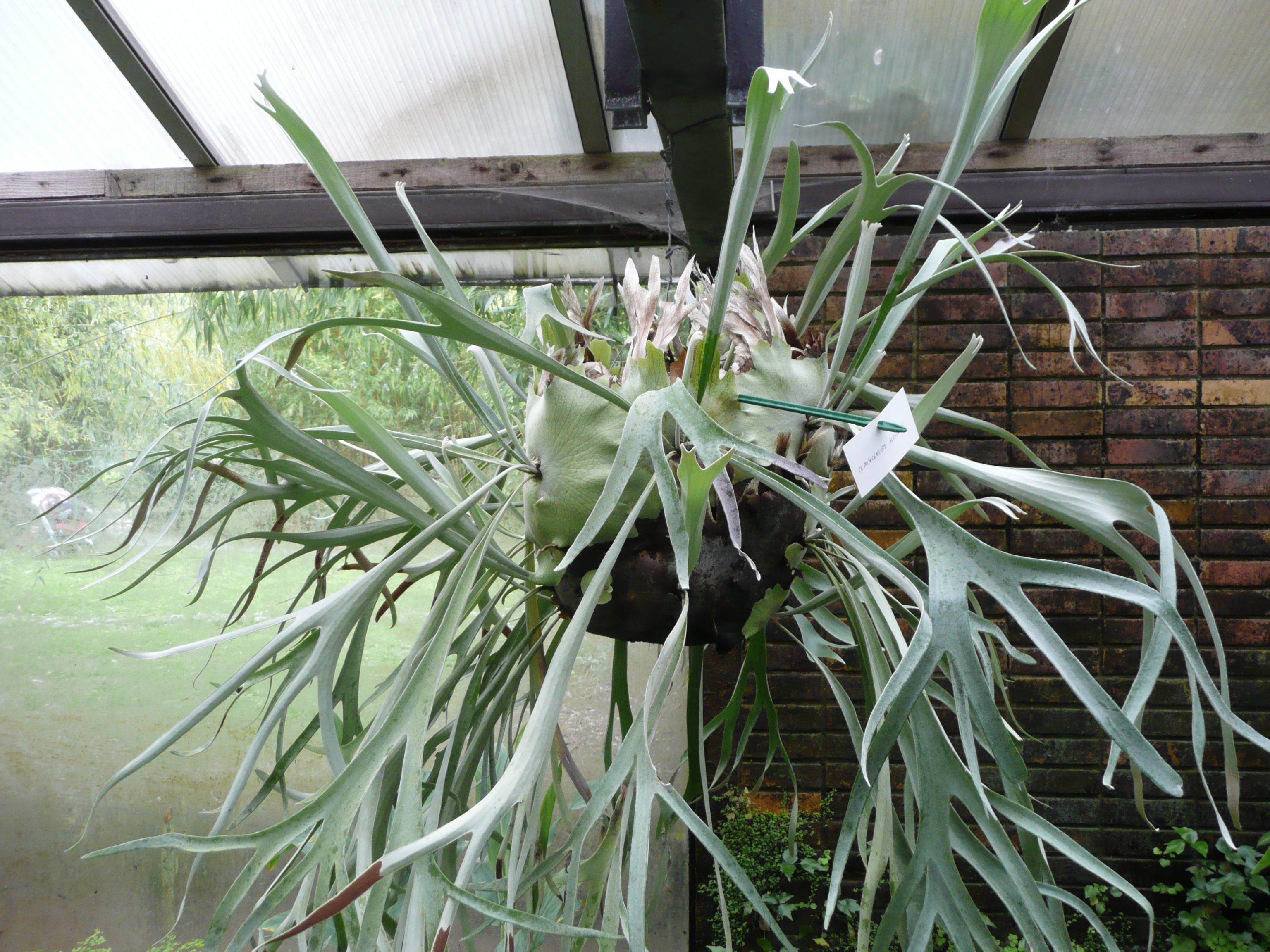 Platycerium alcicorne in Parc floral de Paris Map: 48° 50' 19" N 2° 26' 33" E